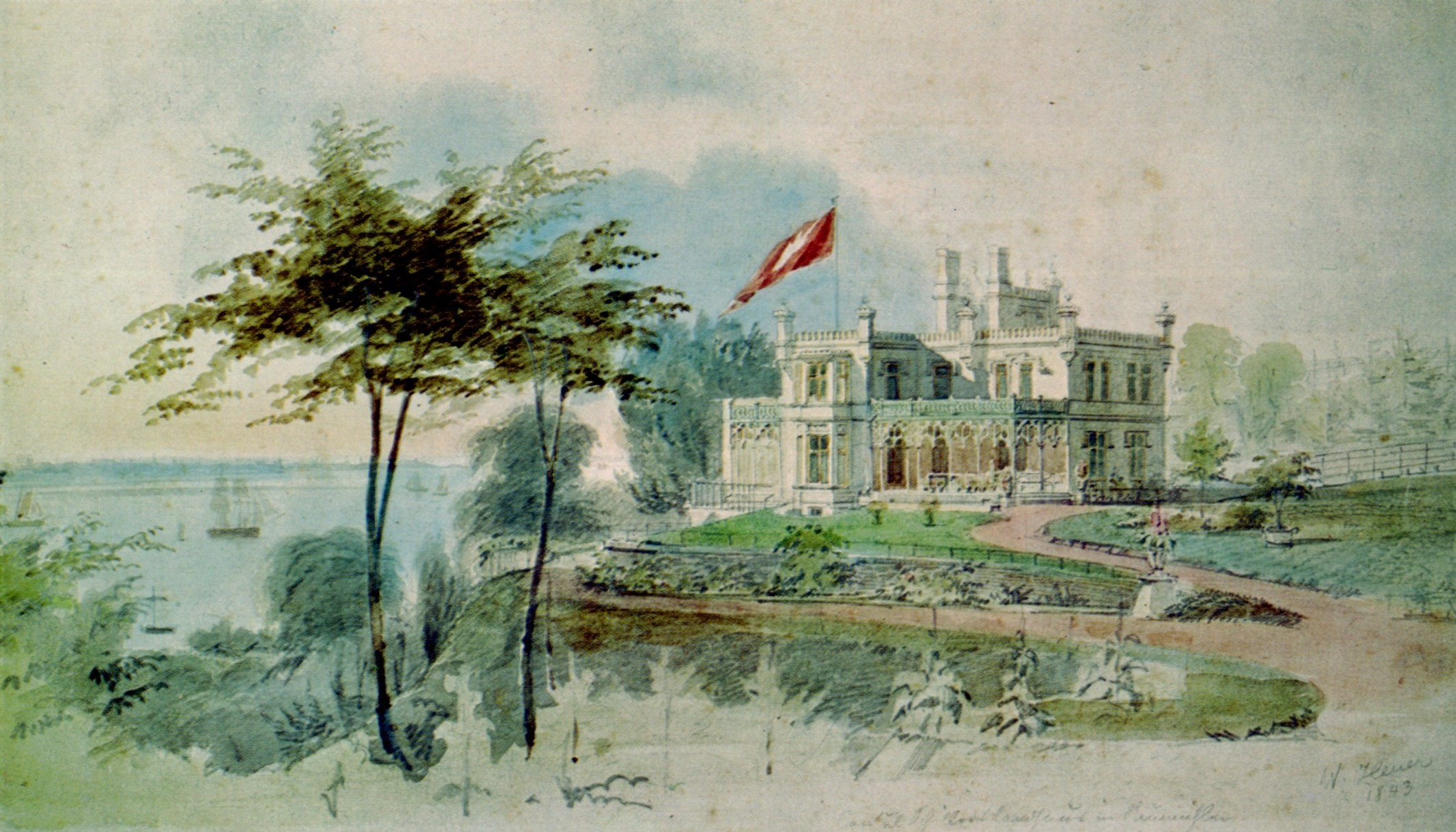 Landhaus Gustav Schiller ("Schillerburg") in Othmarschen, Elbchaussee 185 b, erbaut 1843, Aquarell von Wilhelm Heuer 1843